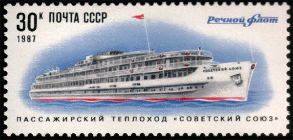 Почтовая марка Почты СССР, 1987 год. Номинал 30 копеек. Серия Речной Флот. Теплоход «Советский Союз» CPA # 5833